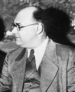 Gaetano Salvemini olasz antifasiszta politikus, történész és író.